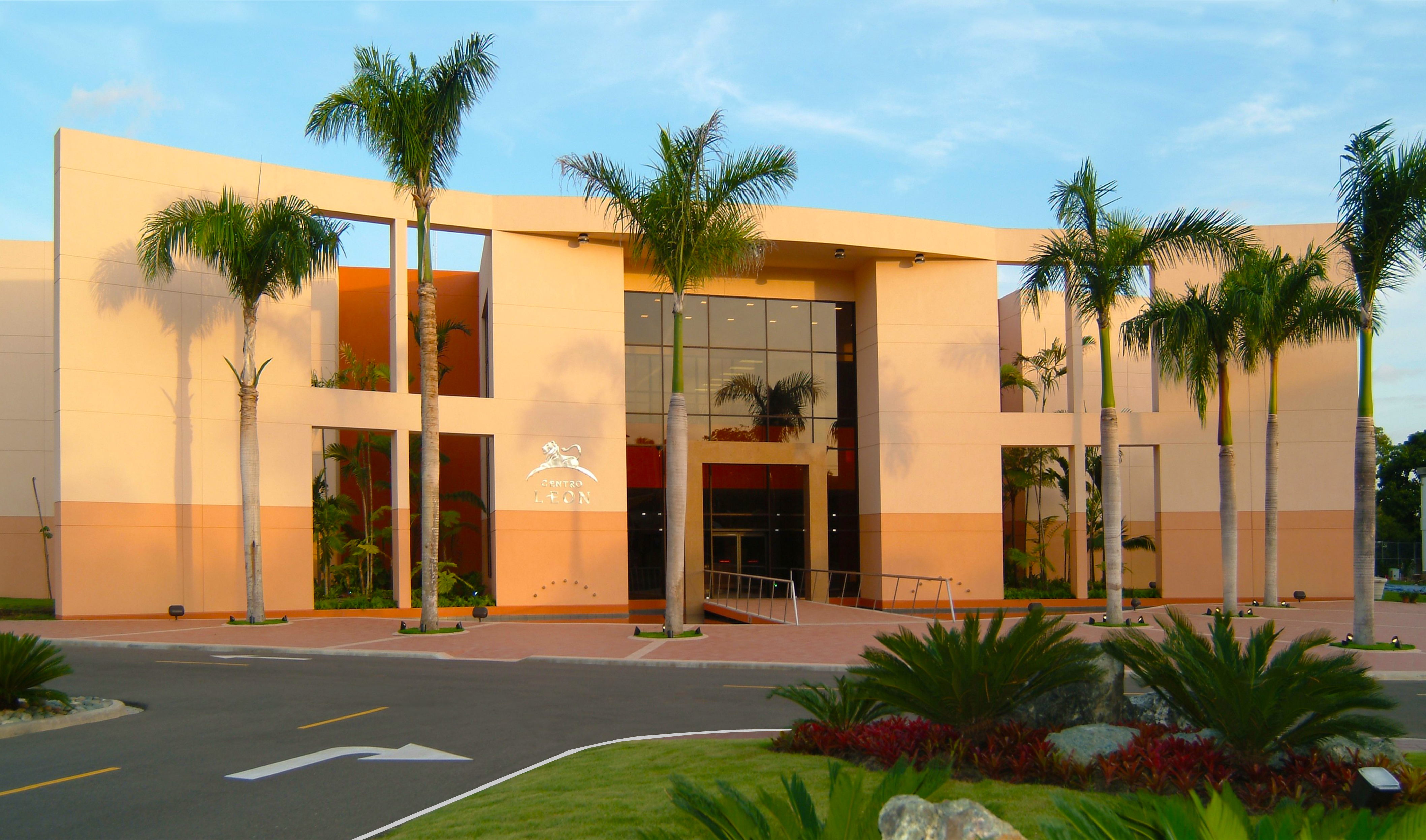 Centro León Jimenes